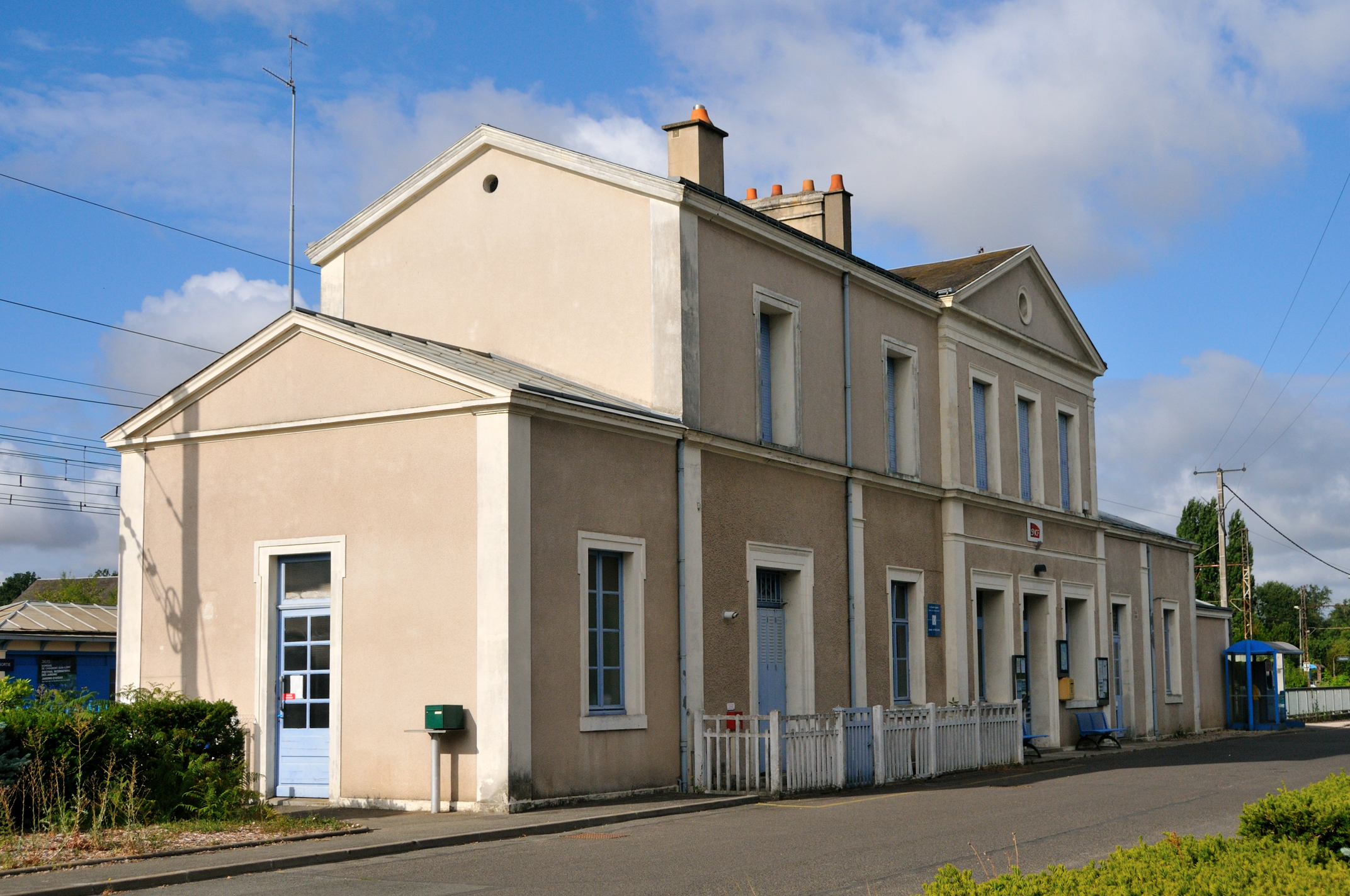 Gare d'Onzain, Loir-et-Cher, France